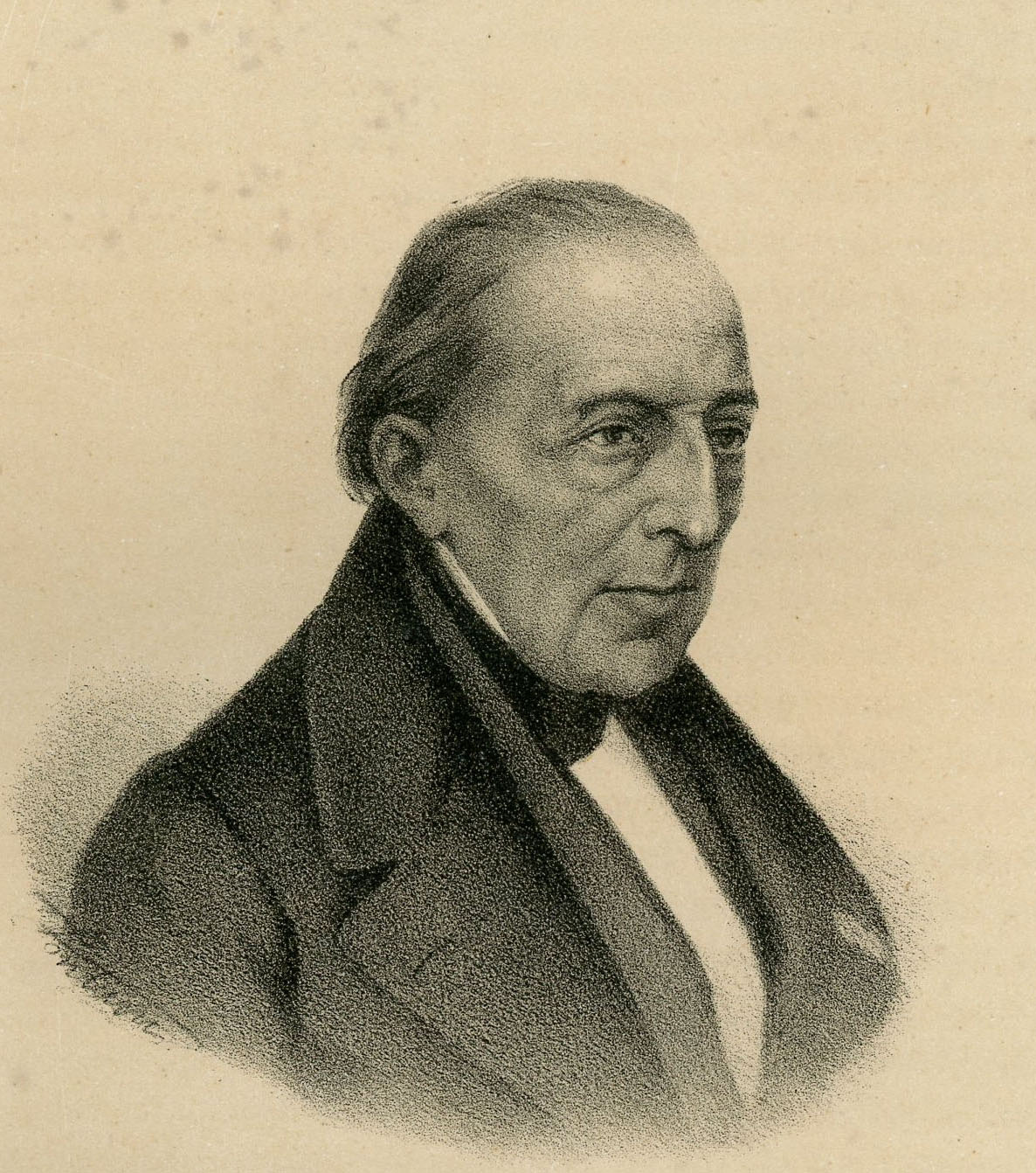 Ritratto di Vittorio Fossombroni (litografia).